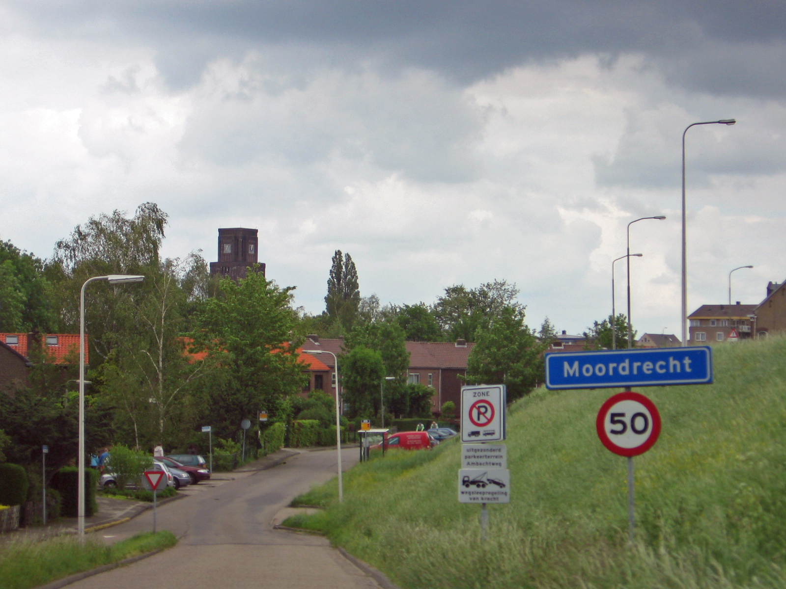 Moordrecht, mei 2006